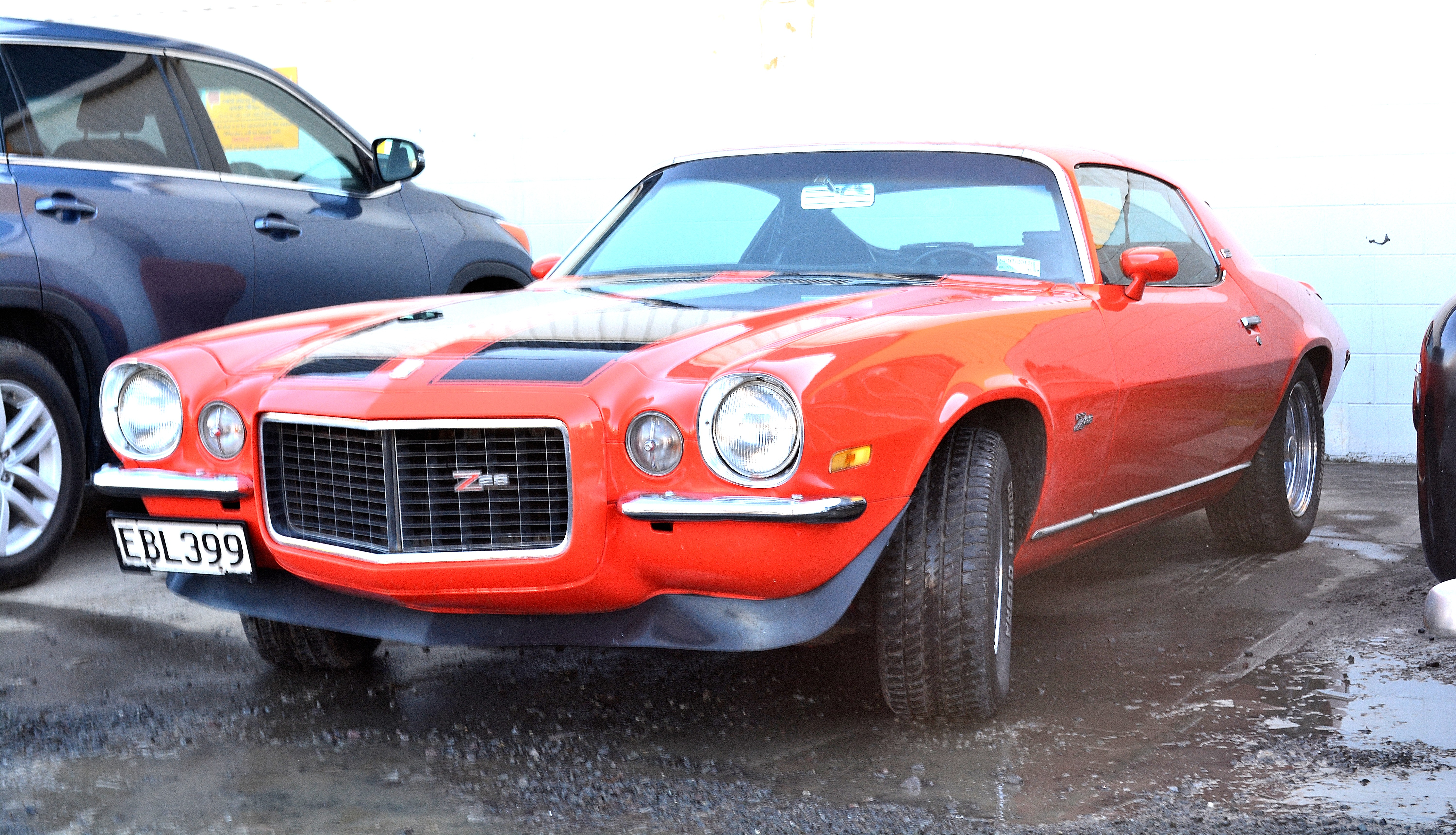 Hangar Bar,West Auckland.New Zealand